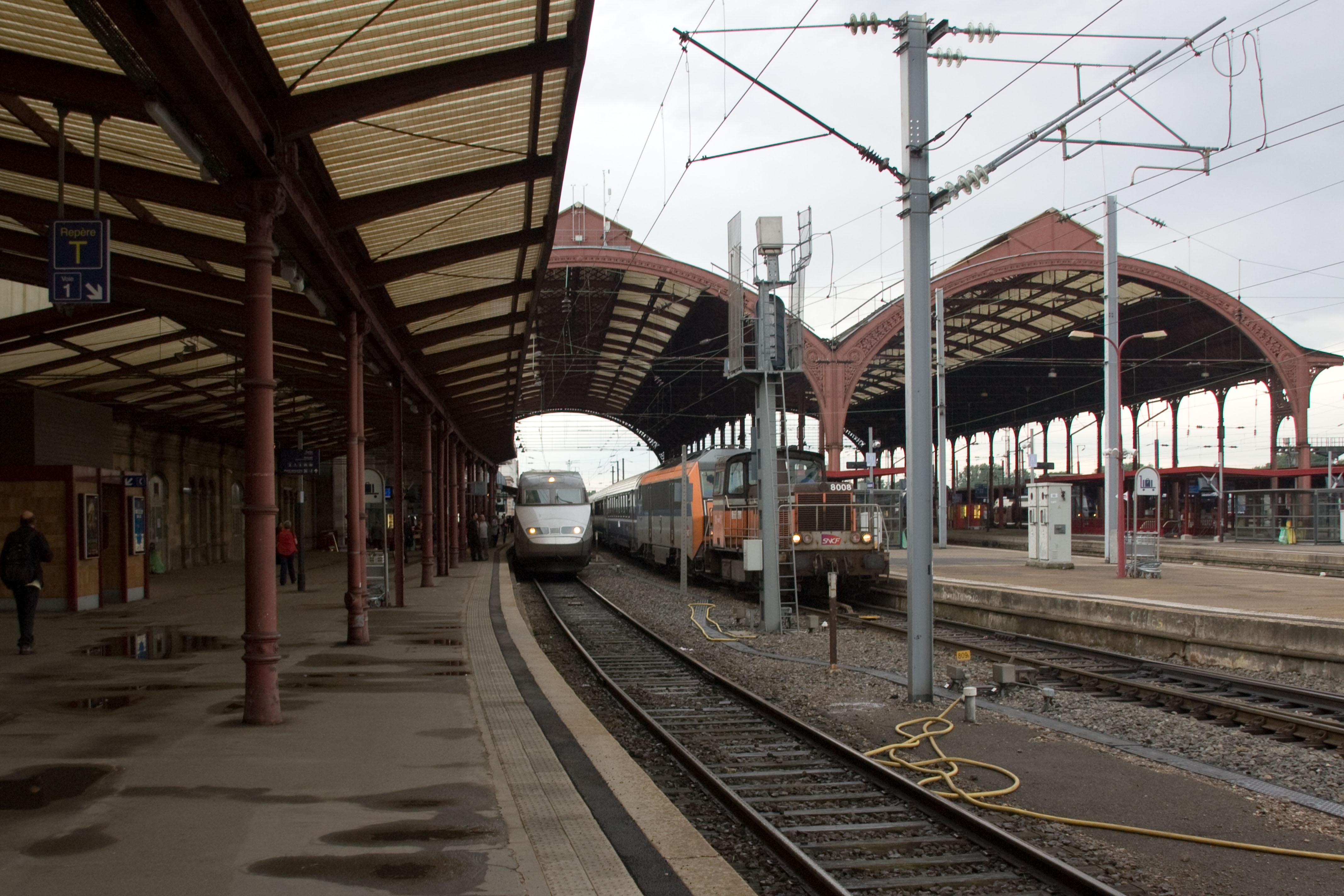 Gare de Strasbourg, Strasbourg, Bas Rhin.